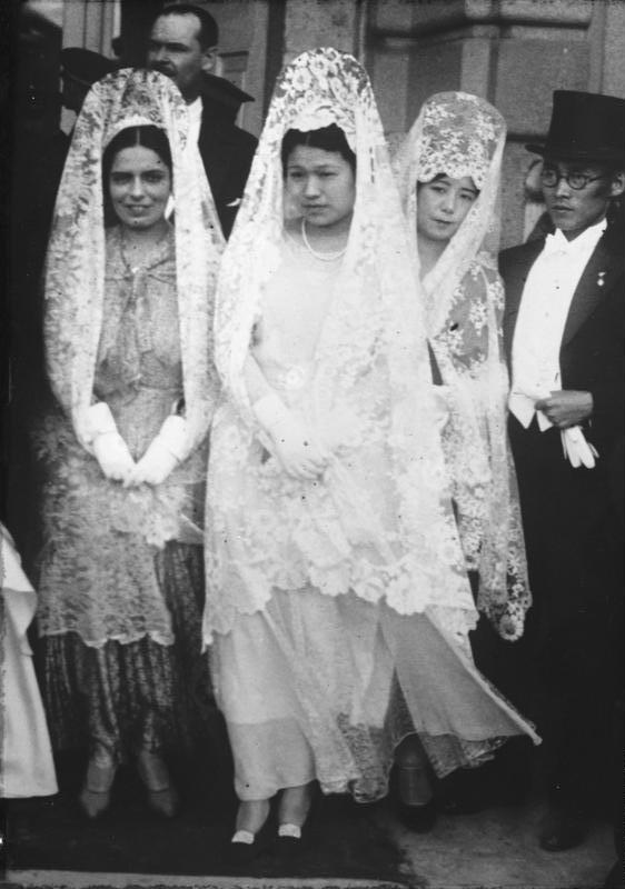 Japan in spanischer Tracht ! Die Gattin des japanischen Botschafters in Madrid mit ihrer Tochter nach einem Empfang. Sie trägt das spanische Nationalkostüm, die Mantille, ein Spitzenkleid mit Haube.